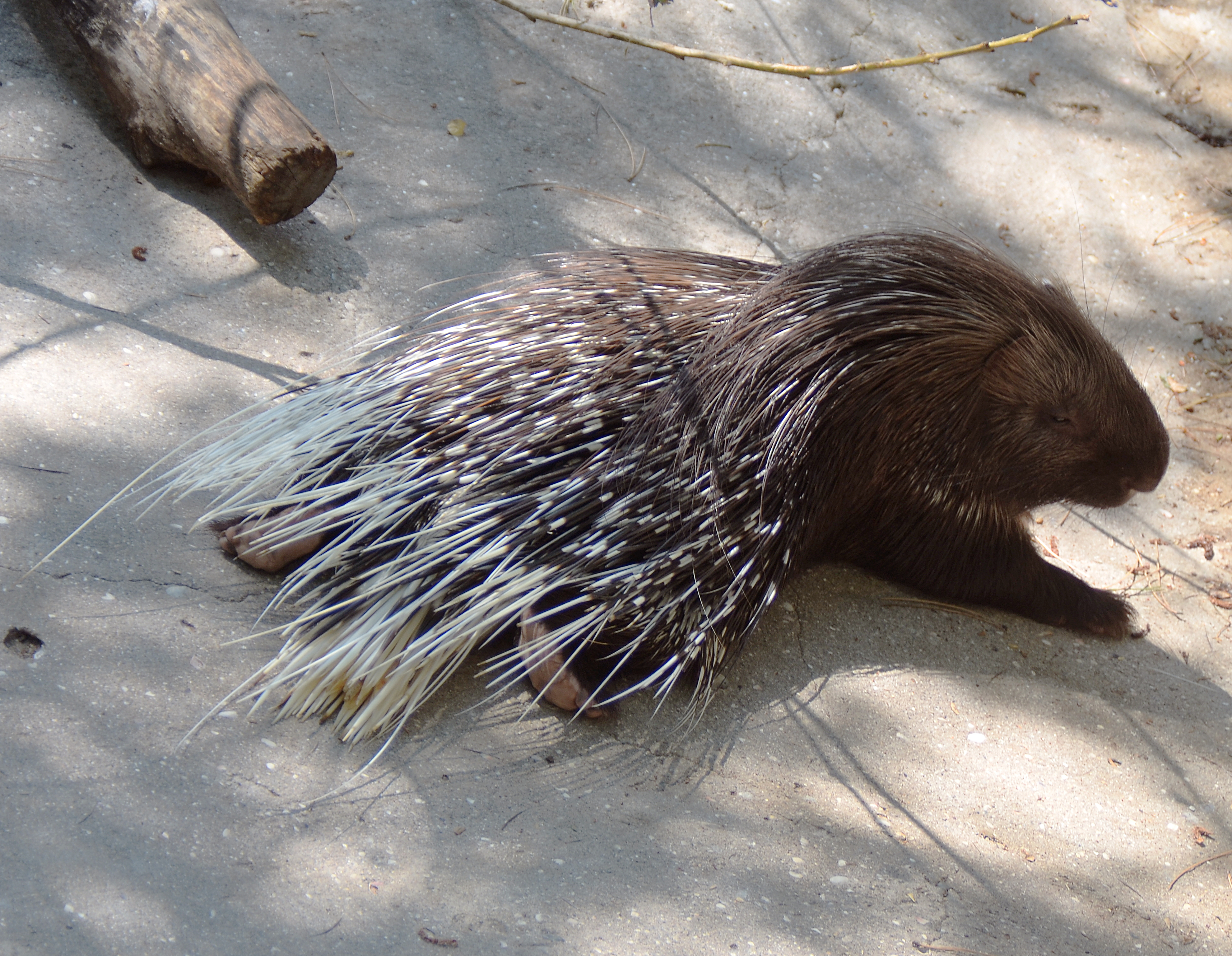 Ялтинский зоопарк.